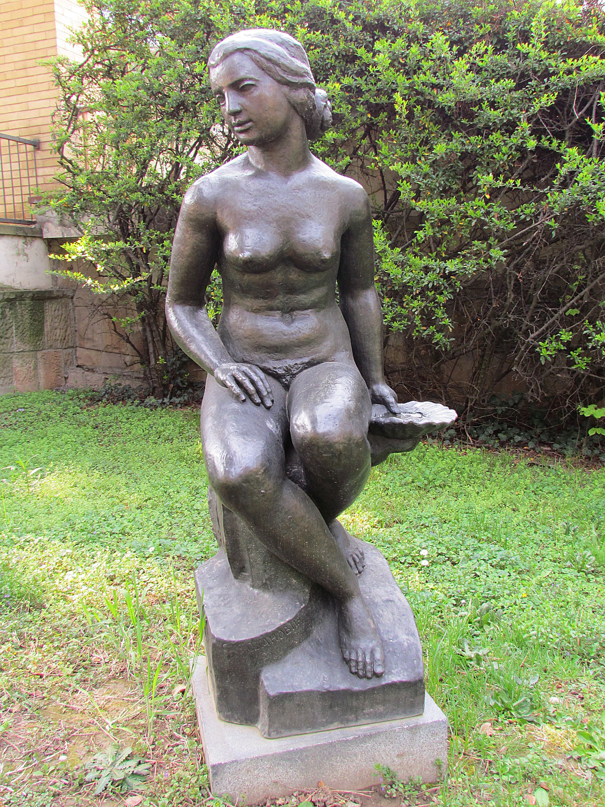 Фонтана, рад Сретена Стојановића (Музеј историје Југославије) фото: Михаило Грбић